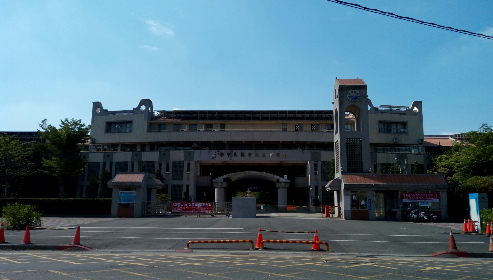 中文（台灣）: 大灣國中校門